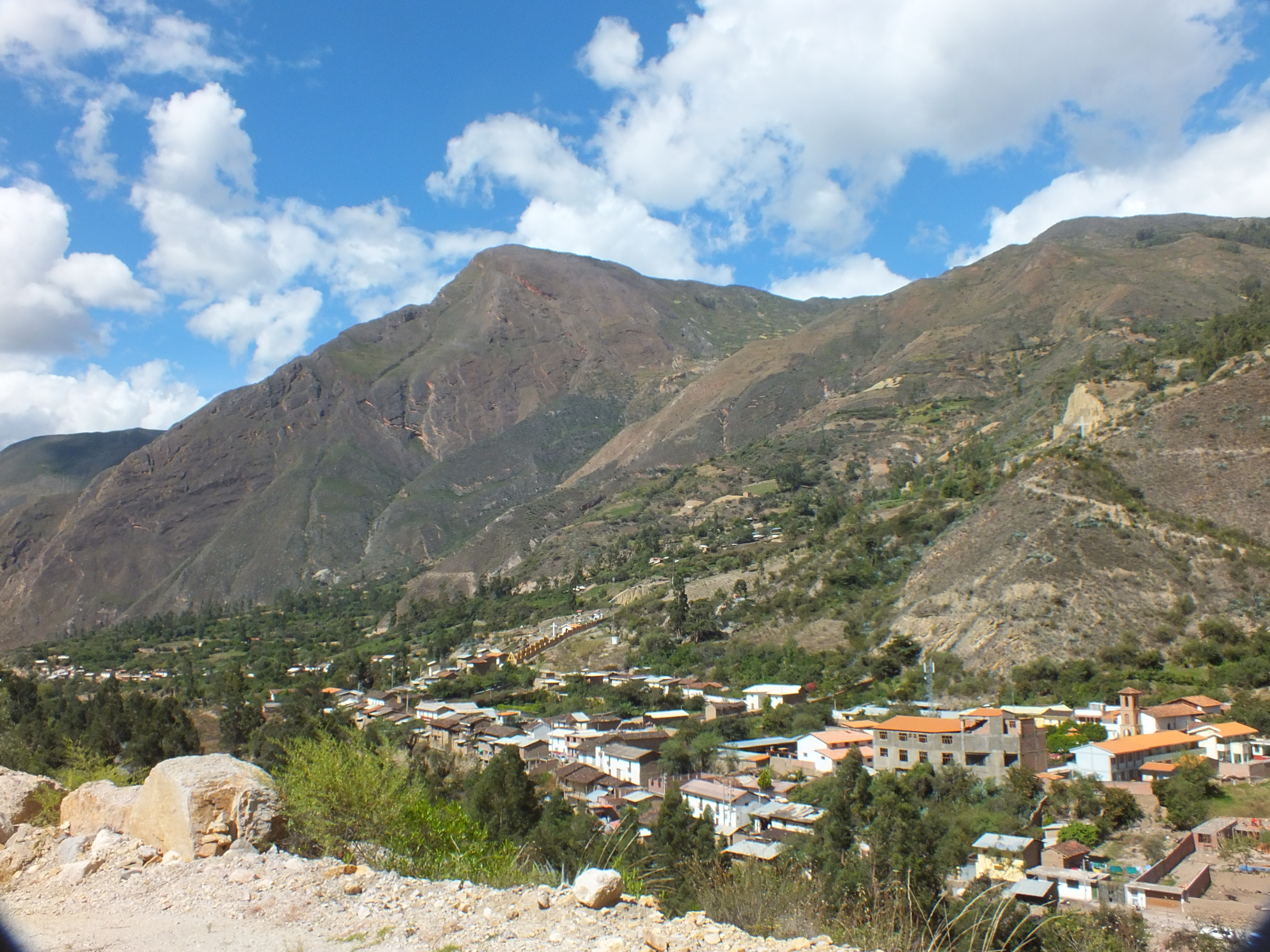 Dos pueblos, una unidad